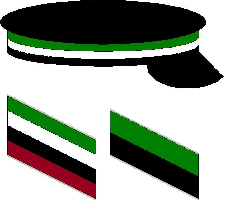 Couleur des Corps Guestphalia et Suevoborussia, Corpsburschenmütze, Corpsburschenband, Fuchsenband (von oben nach unten, von links nach rechts)